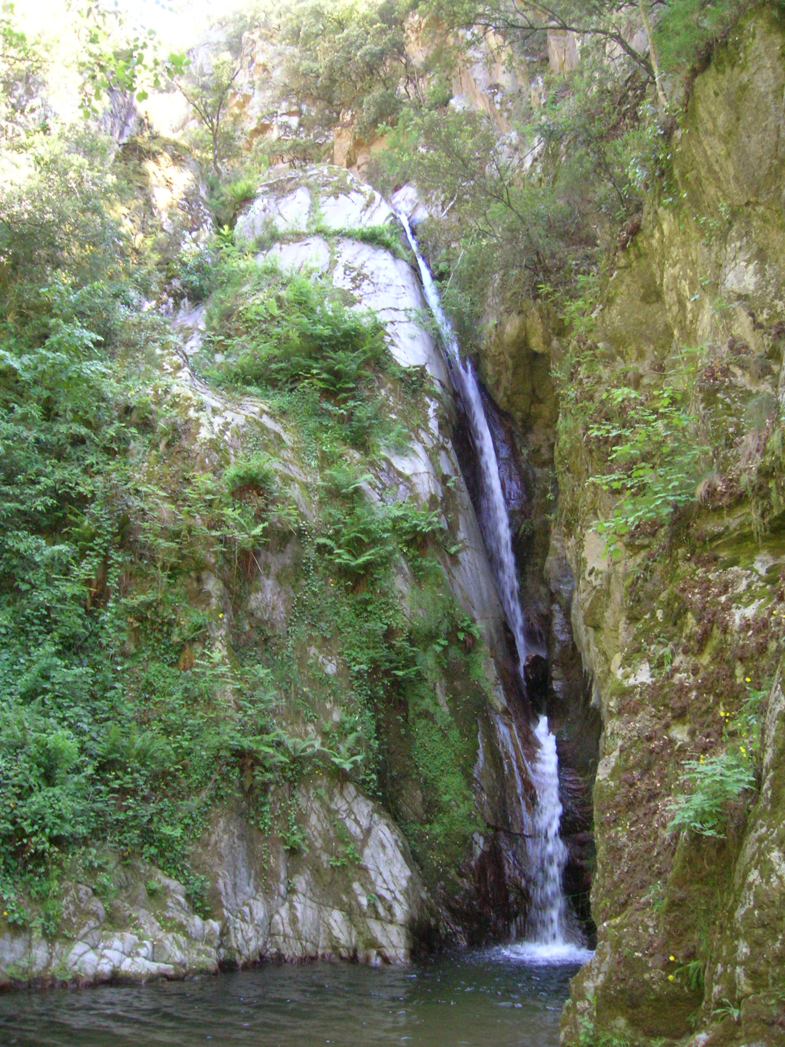 La cascade Salt de Maria Valenta à Arles-sur-Tech dans les Pyrénées-Orientales (France)